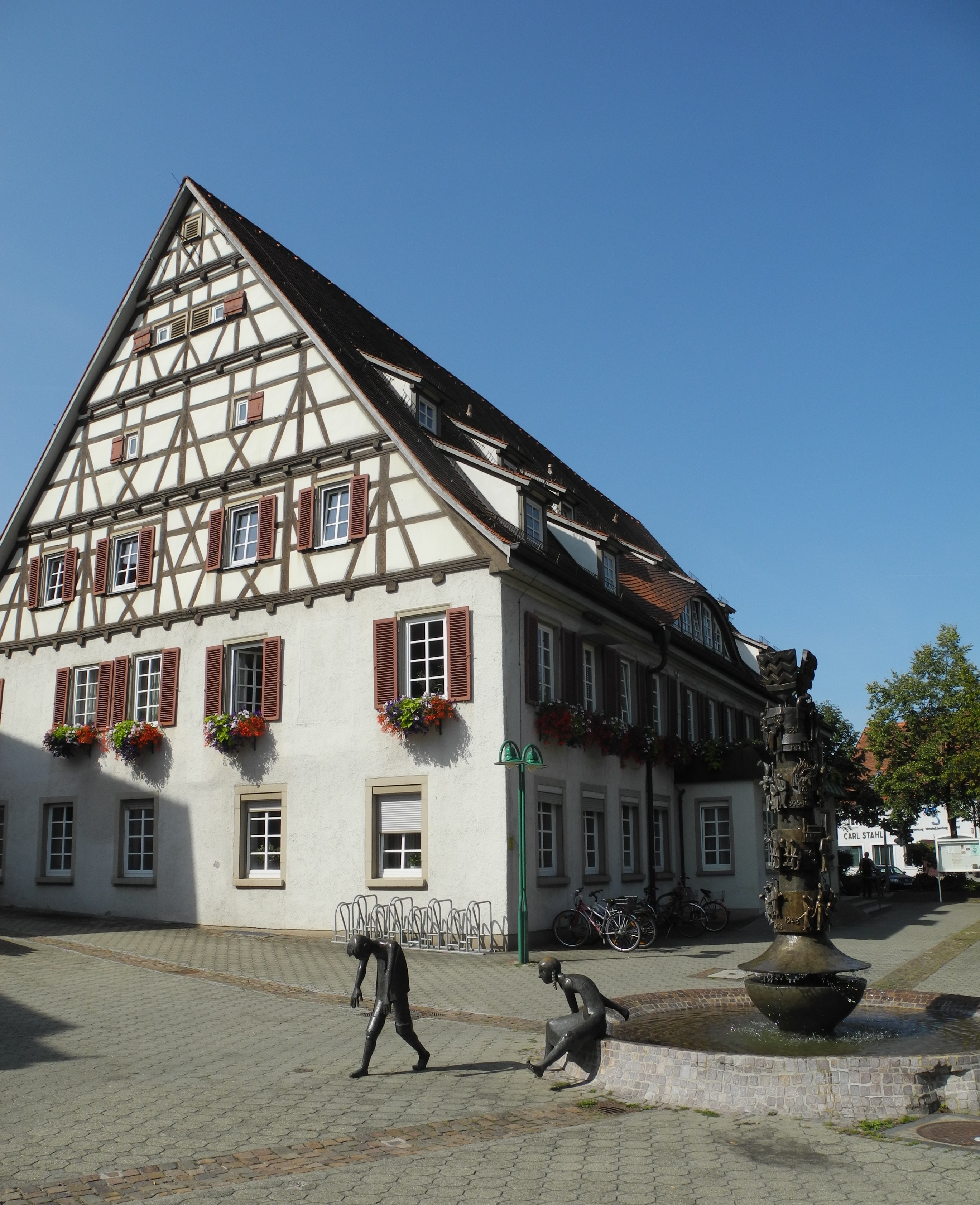 Süßen - Rathaus ab 1512, Fachwerk, mit Brunnen